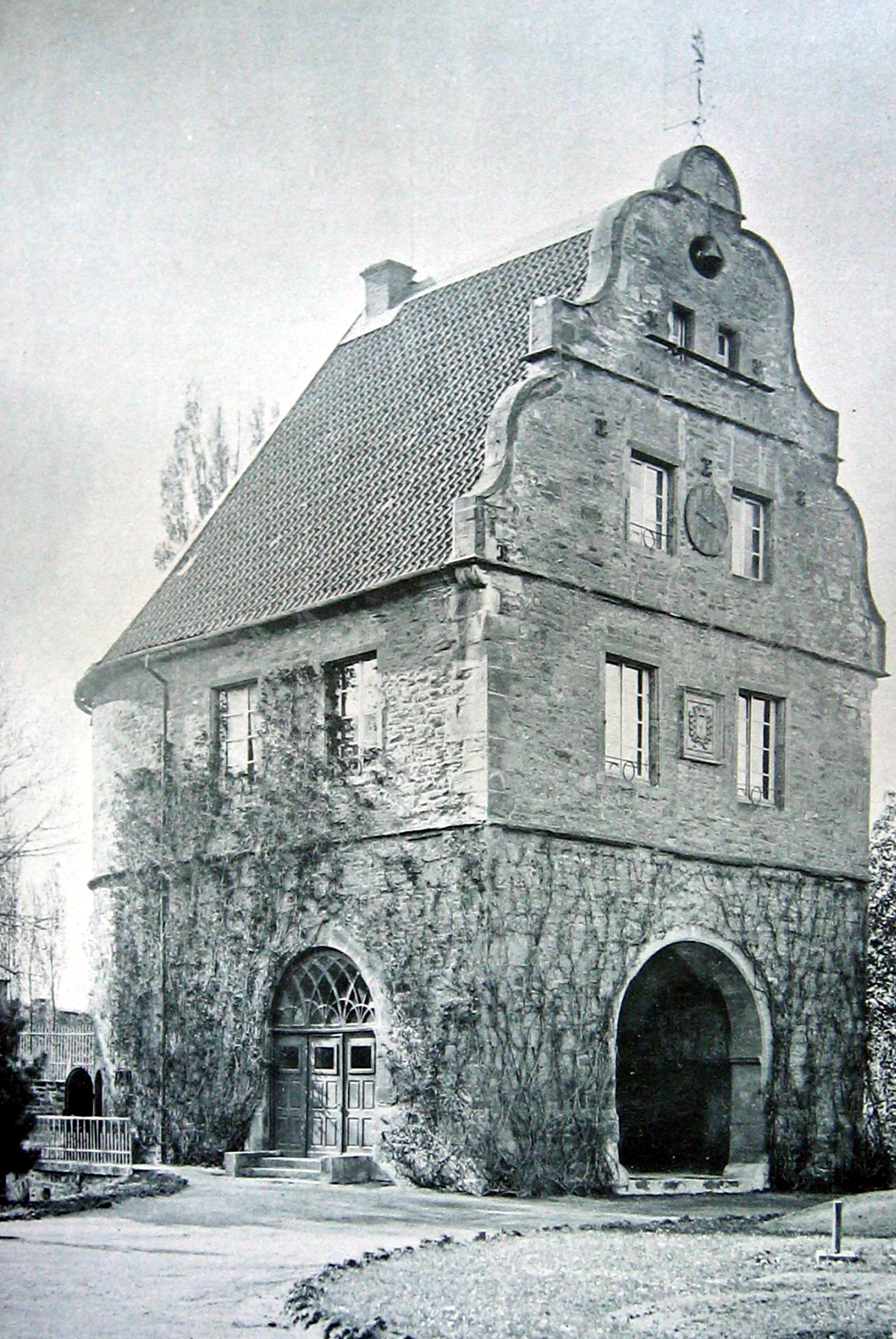 Dortmund, Rittergut Romberg, Torhaus